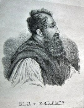 Ferdinand von Geramb, österreichischer Offizier und Trappist (1772-1848)